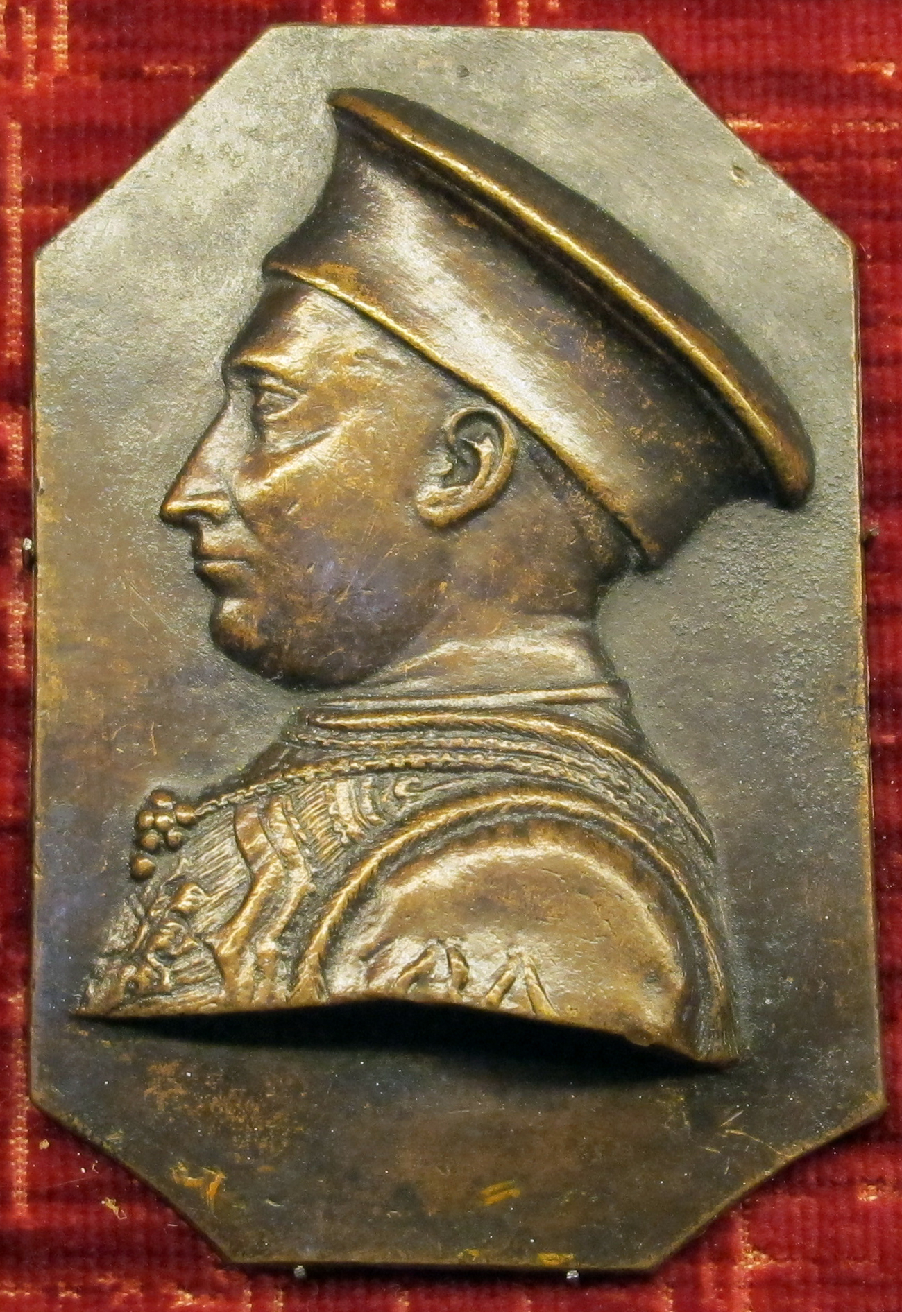 Placchetta di Ludovico III Gonzaga (1412-1478)